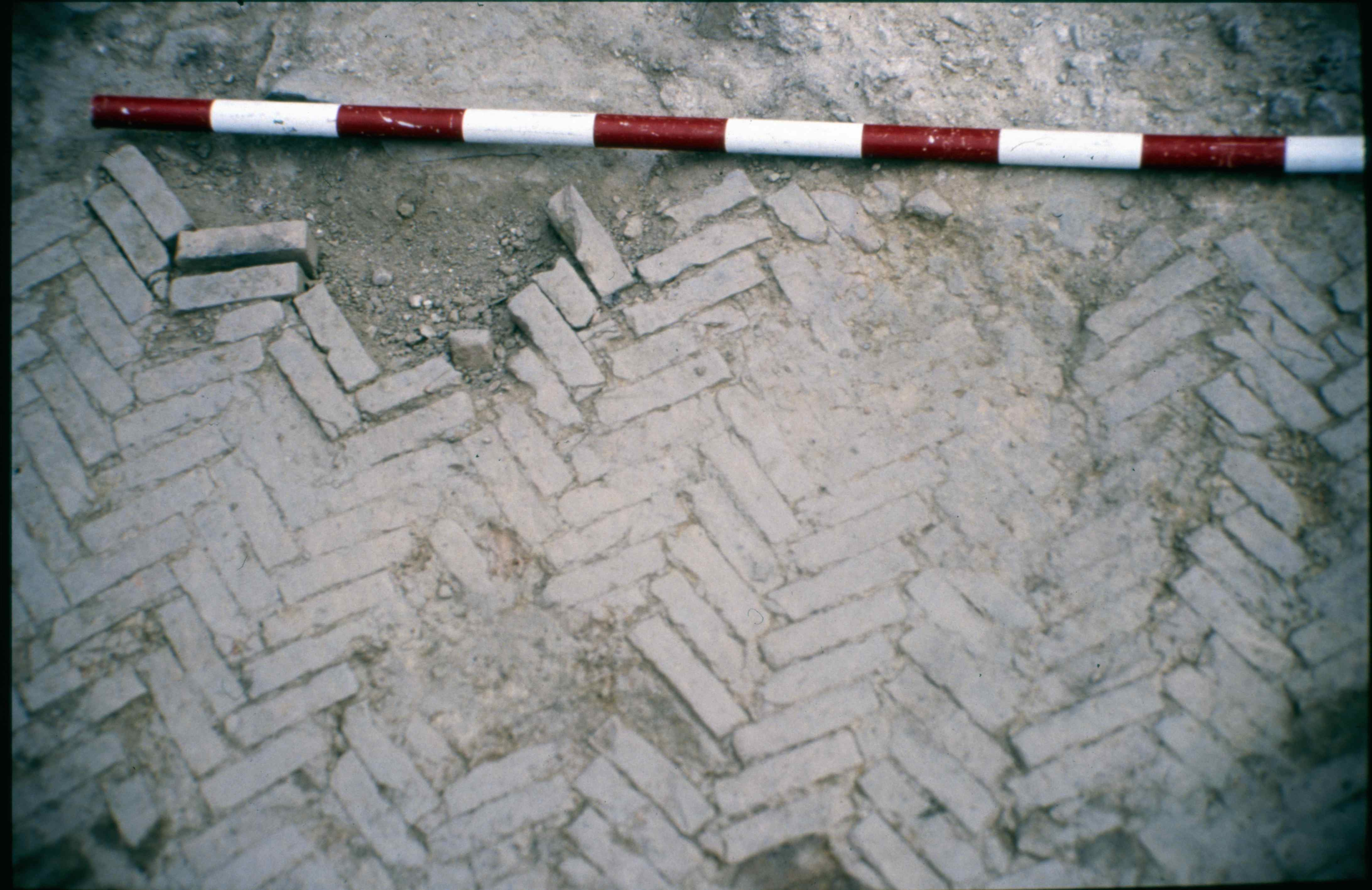 Pavimento de opus spicatum en las Termas Mayores. Excavación realizada en Astorga (León, España). Foto por M.A. Sevillano. Museo Romano de Astorga.